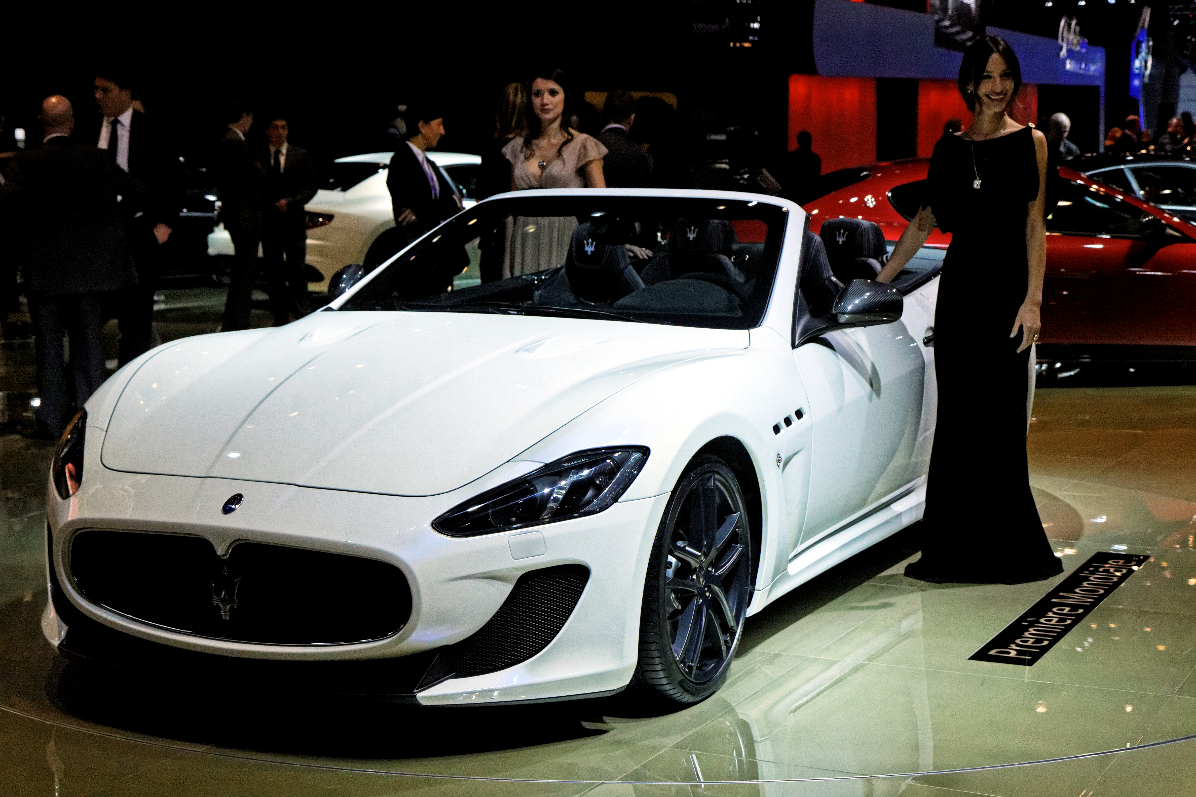 Une Maserati GranCabrio MC présentée lors du Mondial de l'Automobile de Paris 2012.